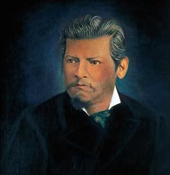 Ignacio Manuel Altamirano (1834-1893), escritor, periodista, maestro y político mexicano originario del estado de Guerrero.